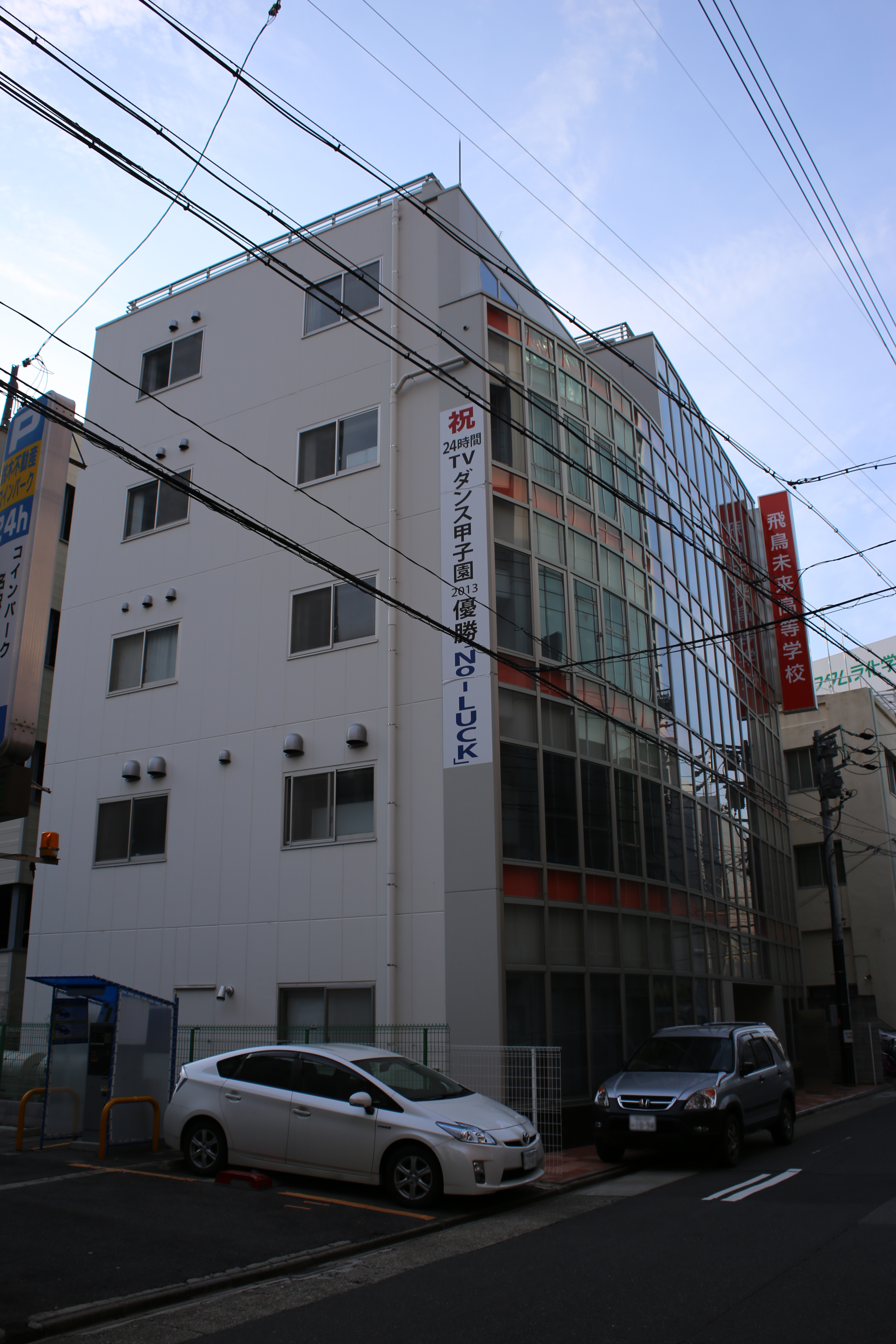 名古屋市西区名駅二丁目の飛鳥未来高等学校名古屋キャンパスを東側公道南側より撮影。ただし、ナンバープレートにつき画像処理済。